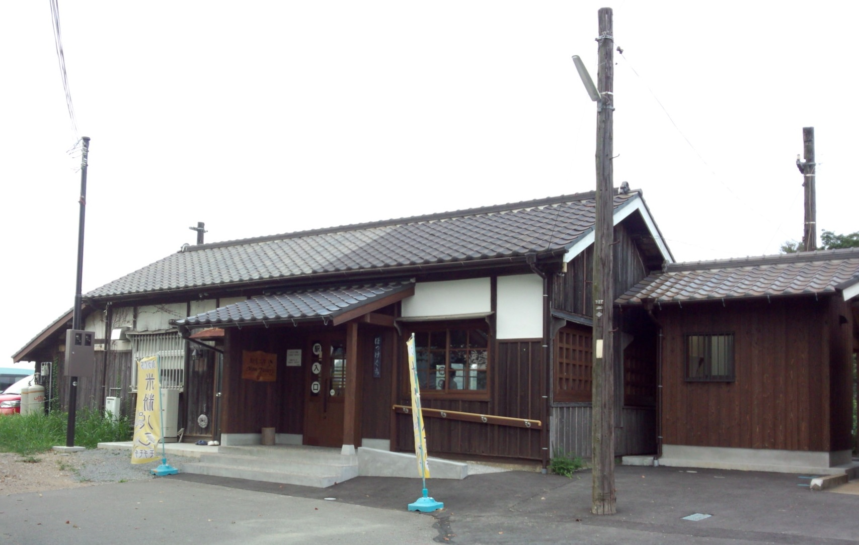 北条鉄道法華口駅舎